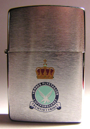 Zippo fra Værnes Flystasjon - Luftforsvaret